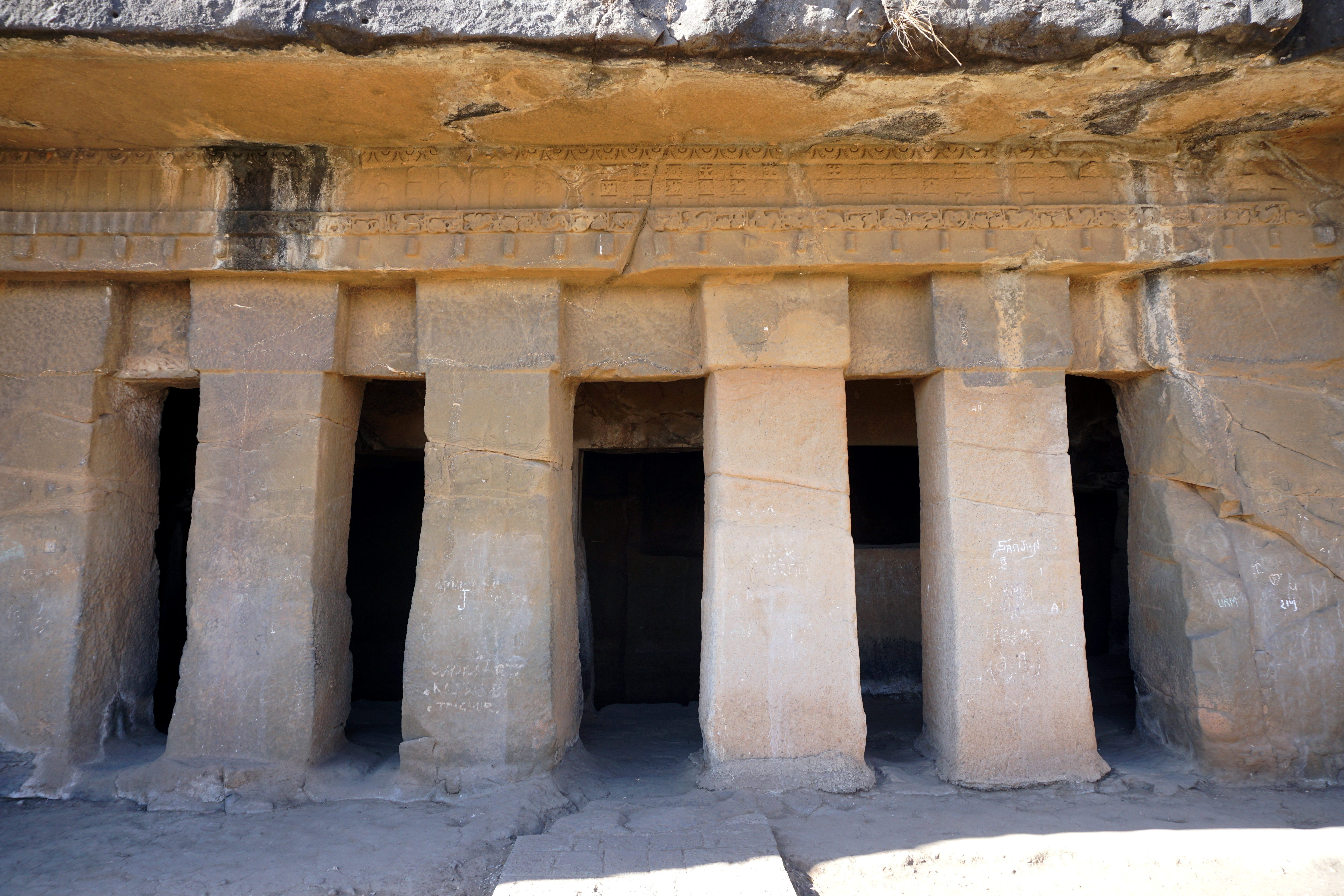 Trirasmi Caves, Nashik, India Pandavlena, Nashik, India